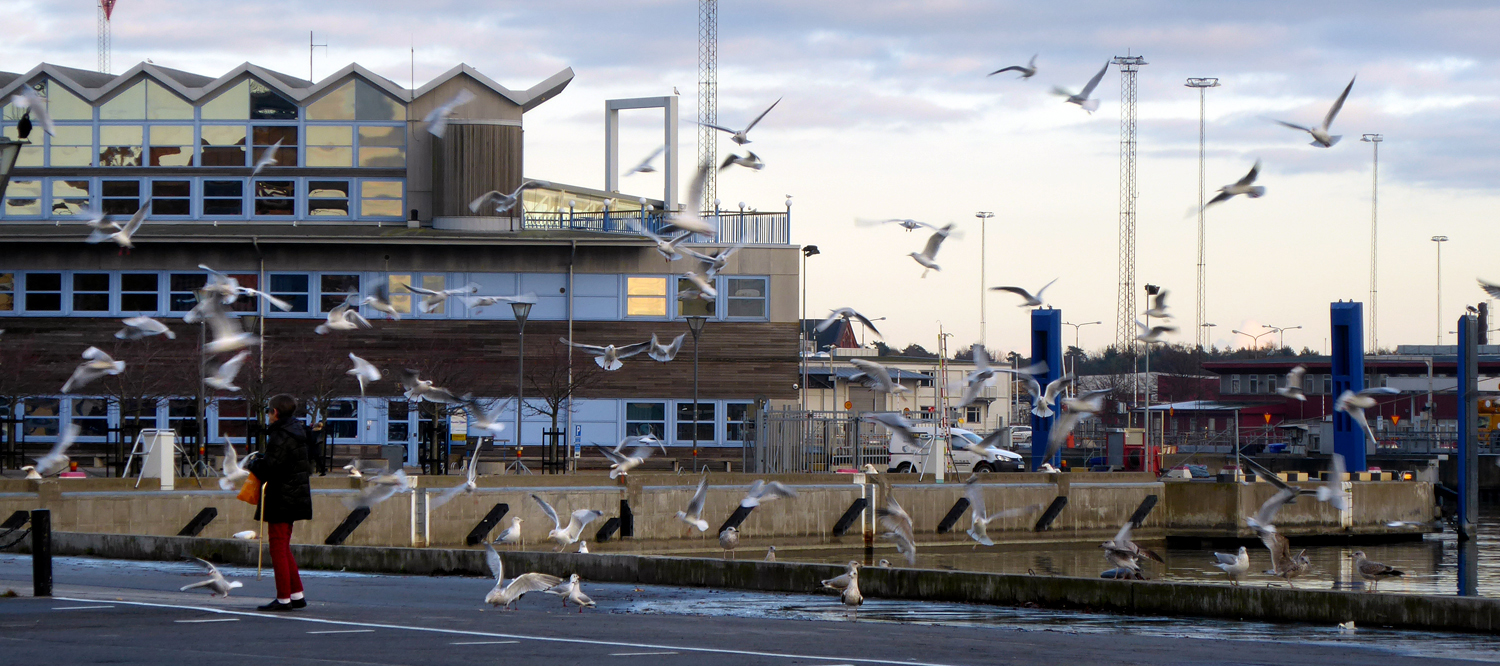 Fågelmatning i Ystads hamn. 12 nov 2016.